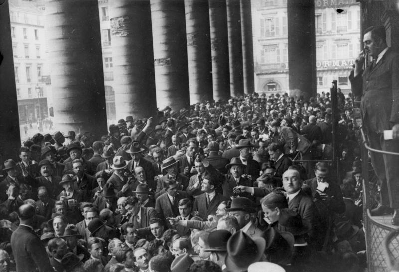 Hochkonjunktur an der Pariser Börse! Paris ist heute das Finanz-Zentrum Europas. Hier lagern die grossen Geld- und Gold-Reserven der Welt. Andrang der Börsenbesucher zu den Ständen der Makler vor dem Börsengebäude in Paris. Im Gegensatz zu der deutschen Börse spielt sich ein grosser Teil des Börsengeschäftes vor der Börse in Paris ab. Die Makler haben ihren Stand auf der grossen Freitreppe, dem Eingang der Börse und tätigen von hier aus die Orders der Kauflustigen.